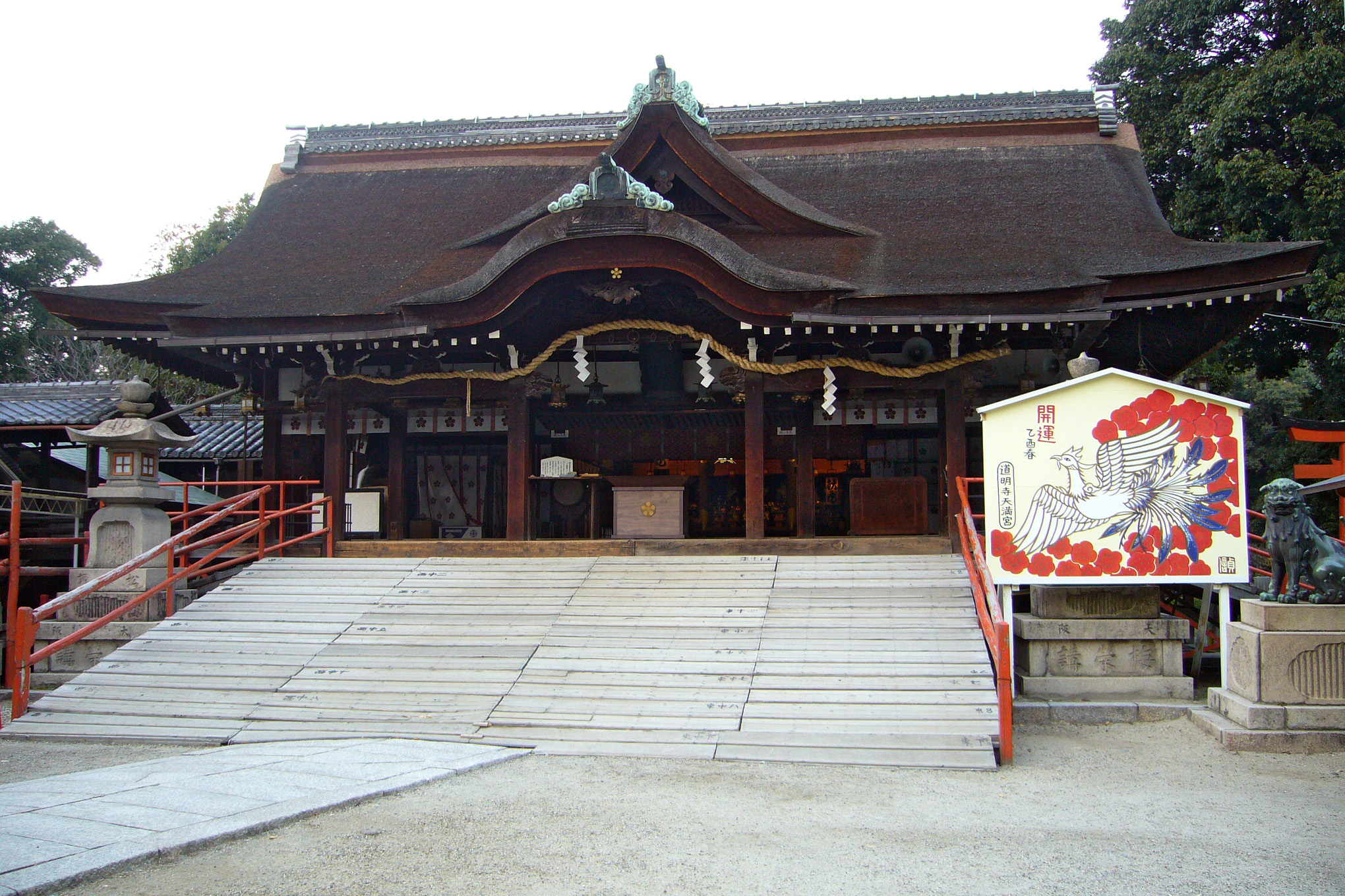 Domyoji-tenmangu in Fujiidera, Osaka, Japan